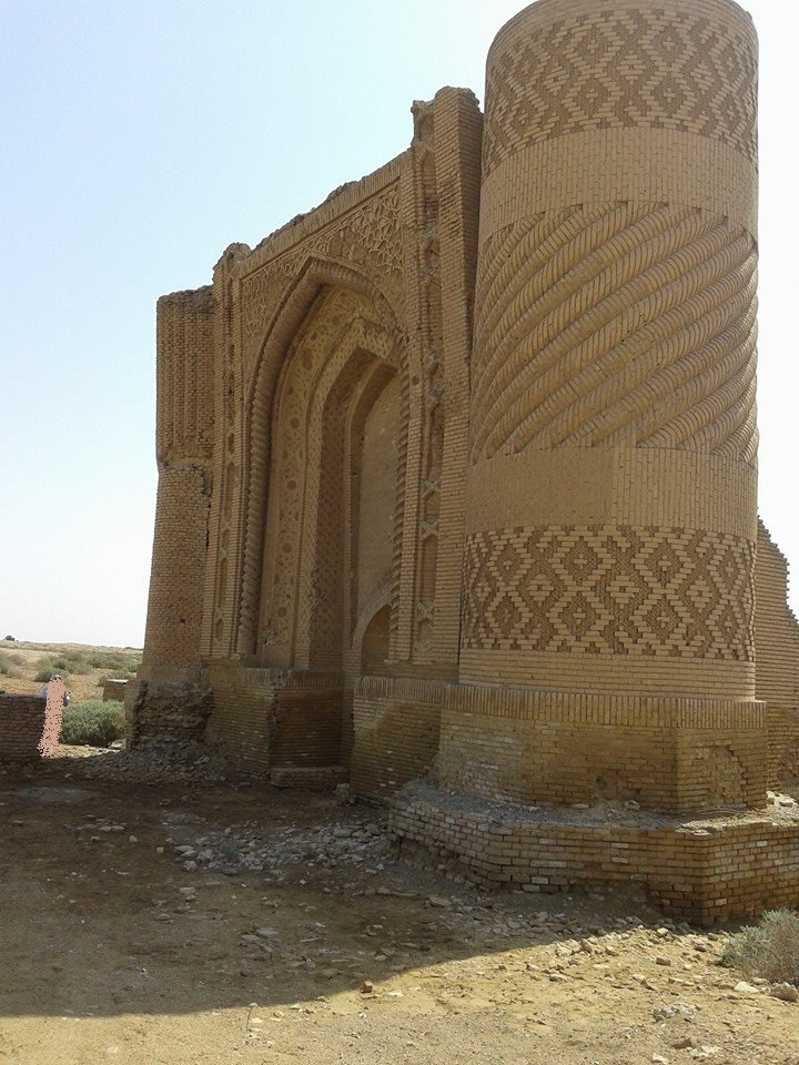 آثار مدينة واسط التاريخية العراق